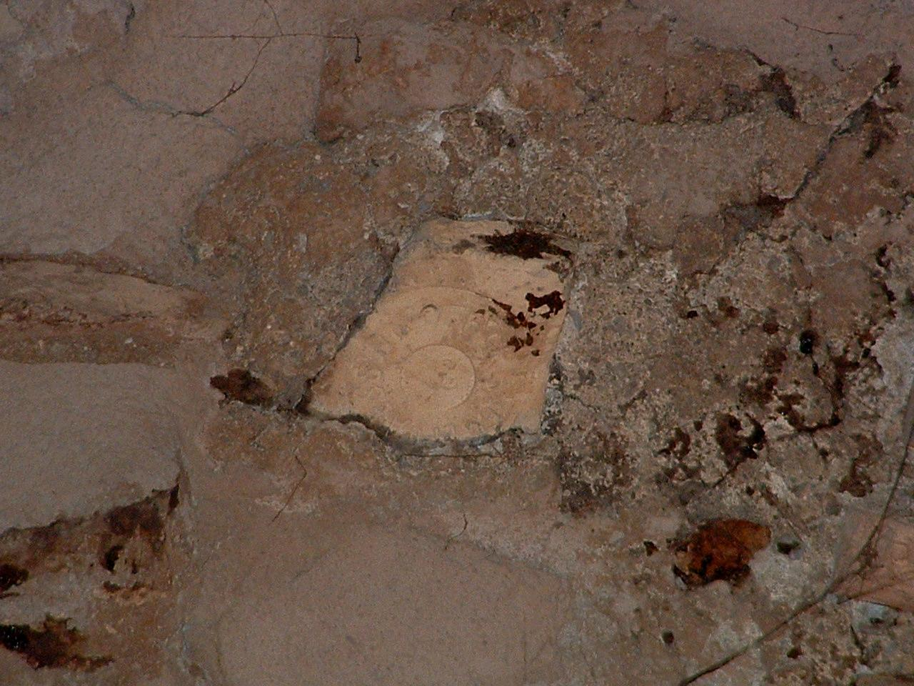 Bollo laterizio di età Dioclezianea presso arco di Malborghetto